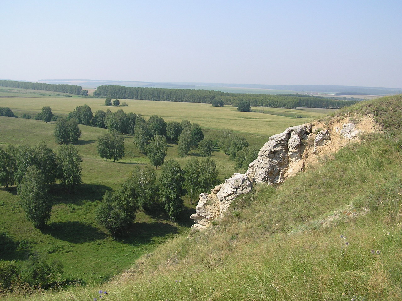 Скалы около пещеры Карламанская (2)